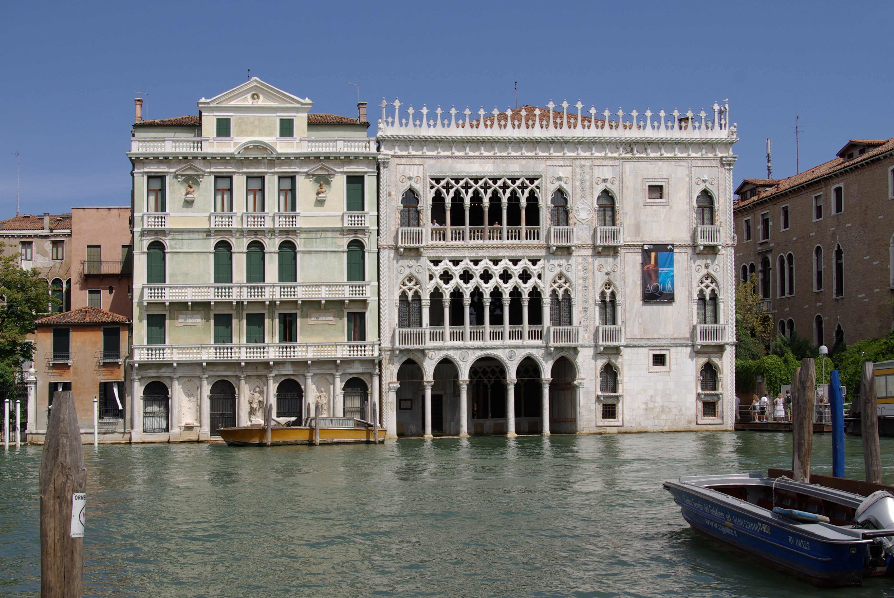 Palazzo Giusti und die Ca' d'Oro in Venedig